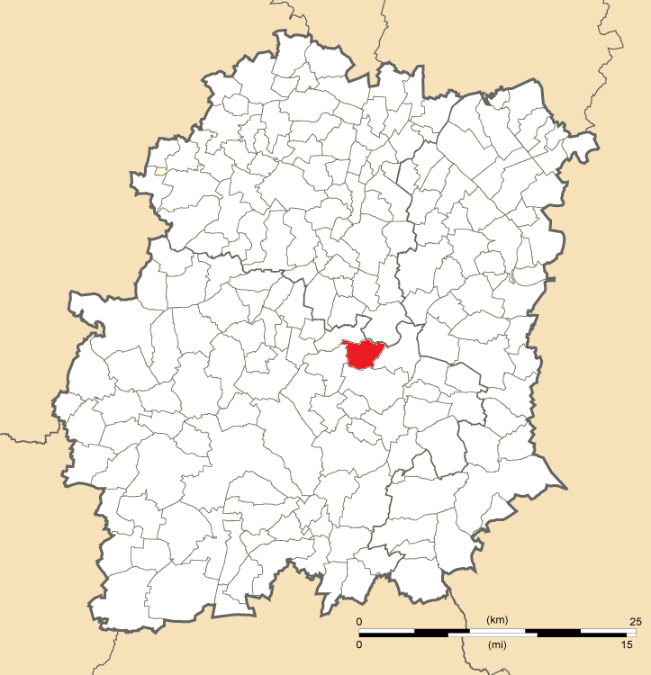 Carte de position de Bouray-sur-Juine en Essonne (91)